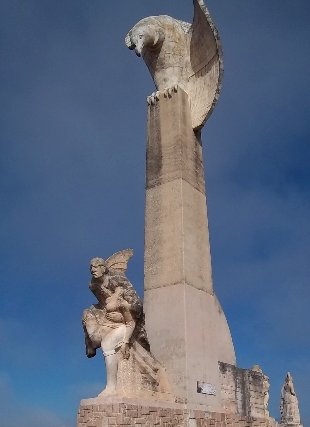 El monumento al Indio Bamba, en Tanti, es una de sus más importantes obras escultóricas.